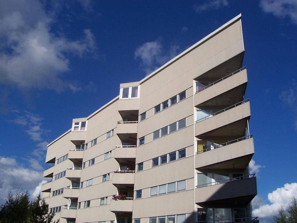 Photo: Verspieder. V Ersboda 2006-08-30.